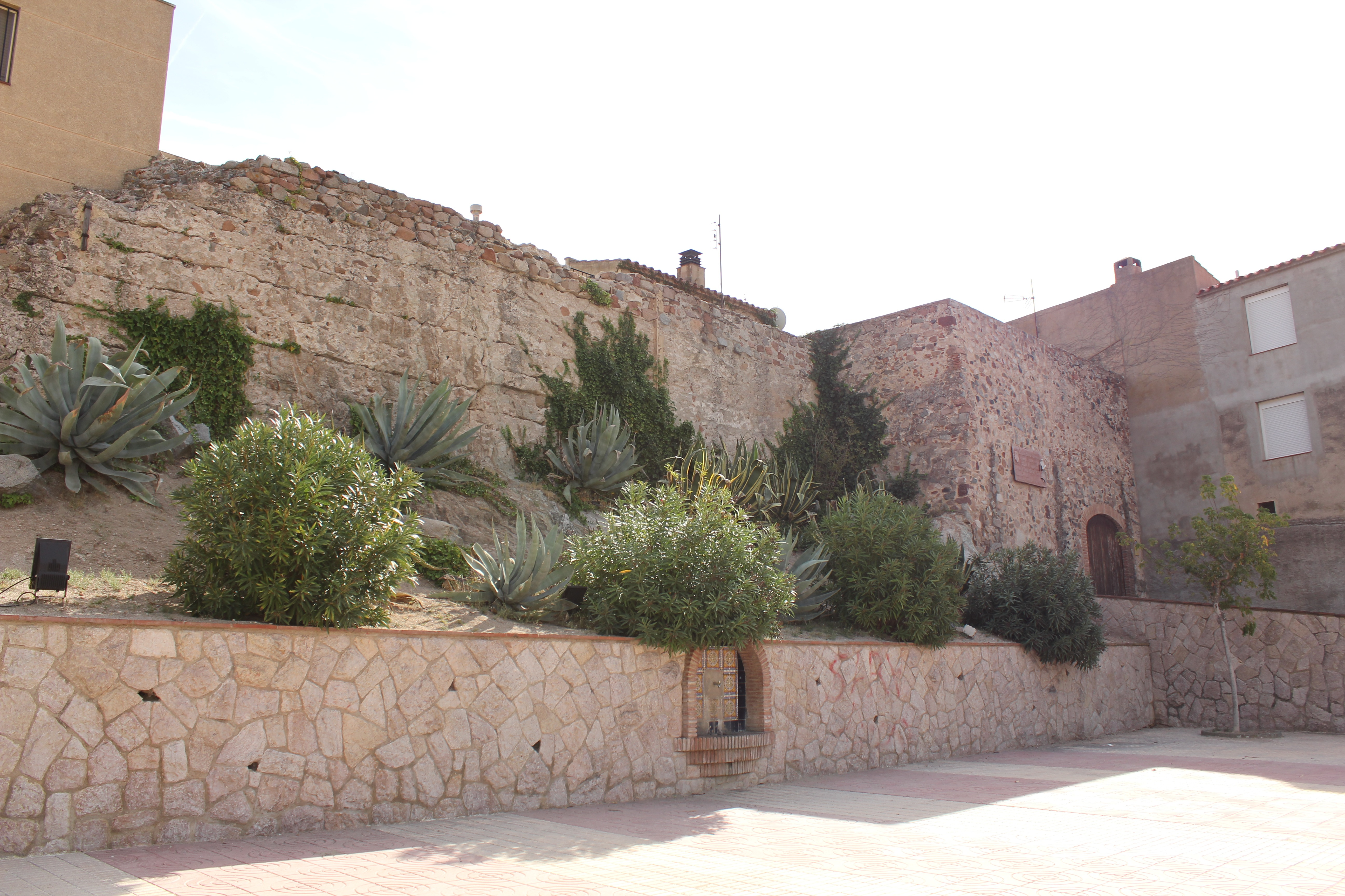 Castell d'Alforja